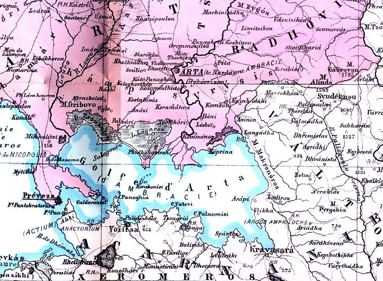 Χάρτης του Αμβρακικού κόλπου, 1878